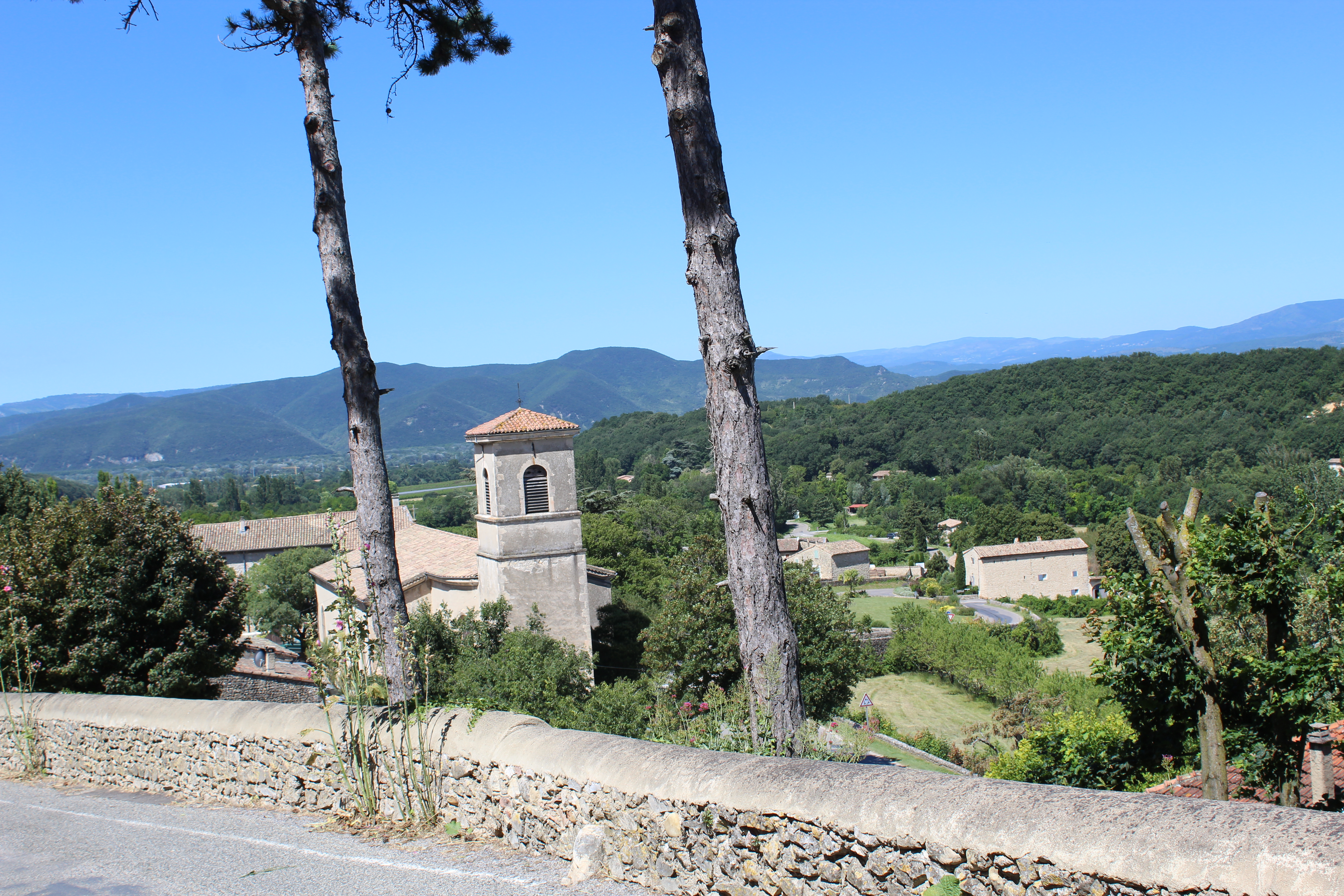 L'église